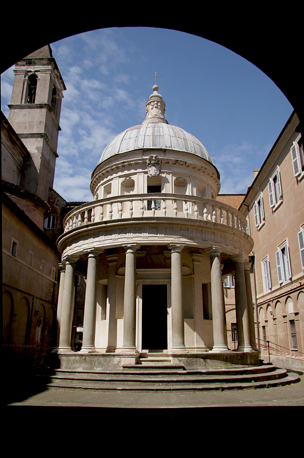 Tempietto del Bramante a San Pietro in Montorio, Roma.